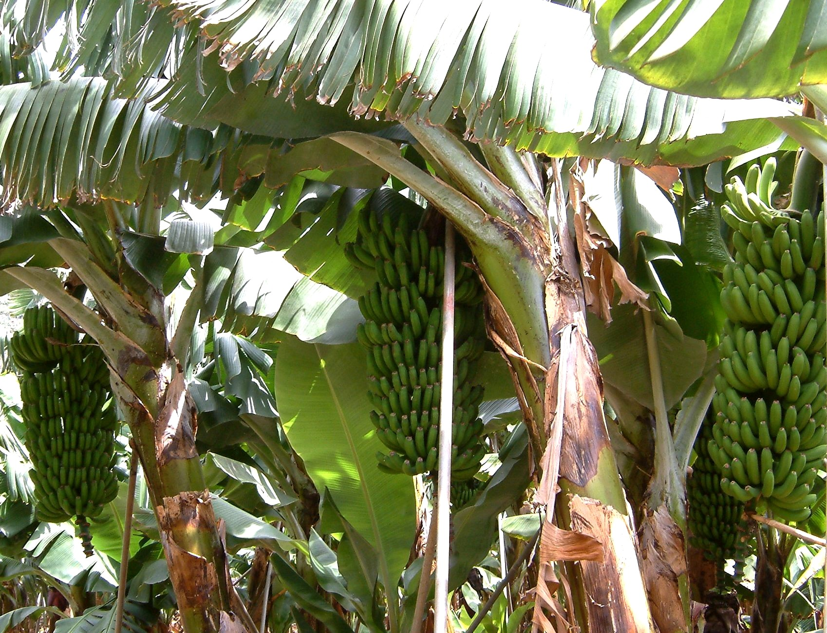 Madeira_bananenplantage_Madalena_do_Mar_südküste_5-07. Photograph: Peggy